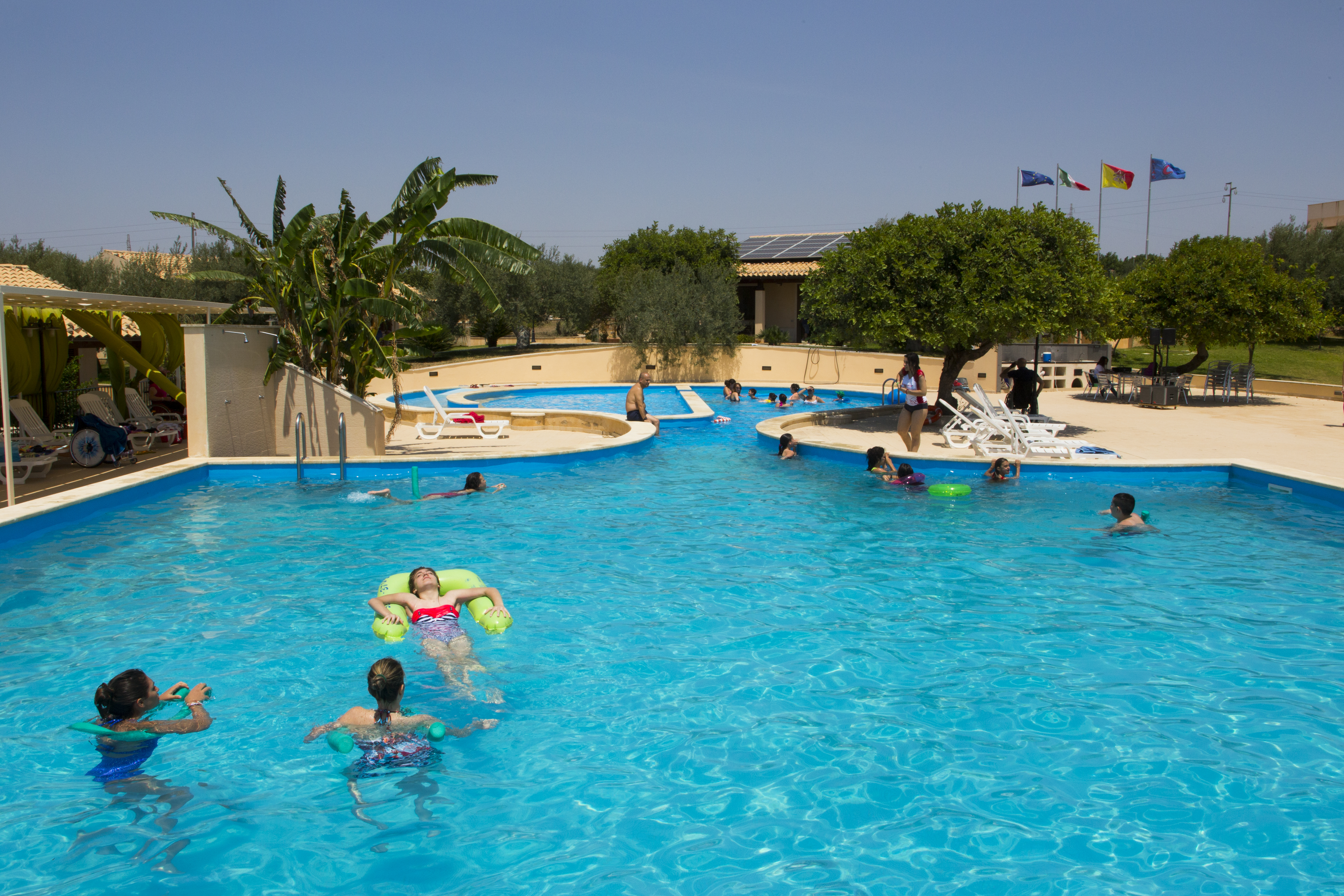 Il Kikki Village Resort, villaggio vacanze per tutti a Modica (RG)